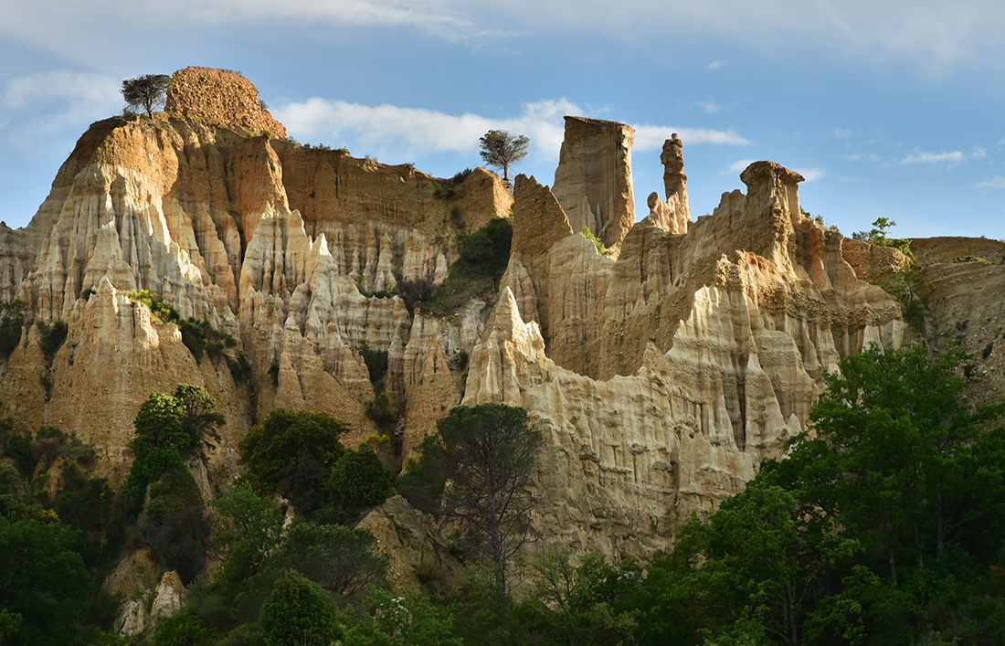 Matte Roudoune by Kévin Goubern